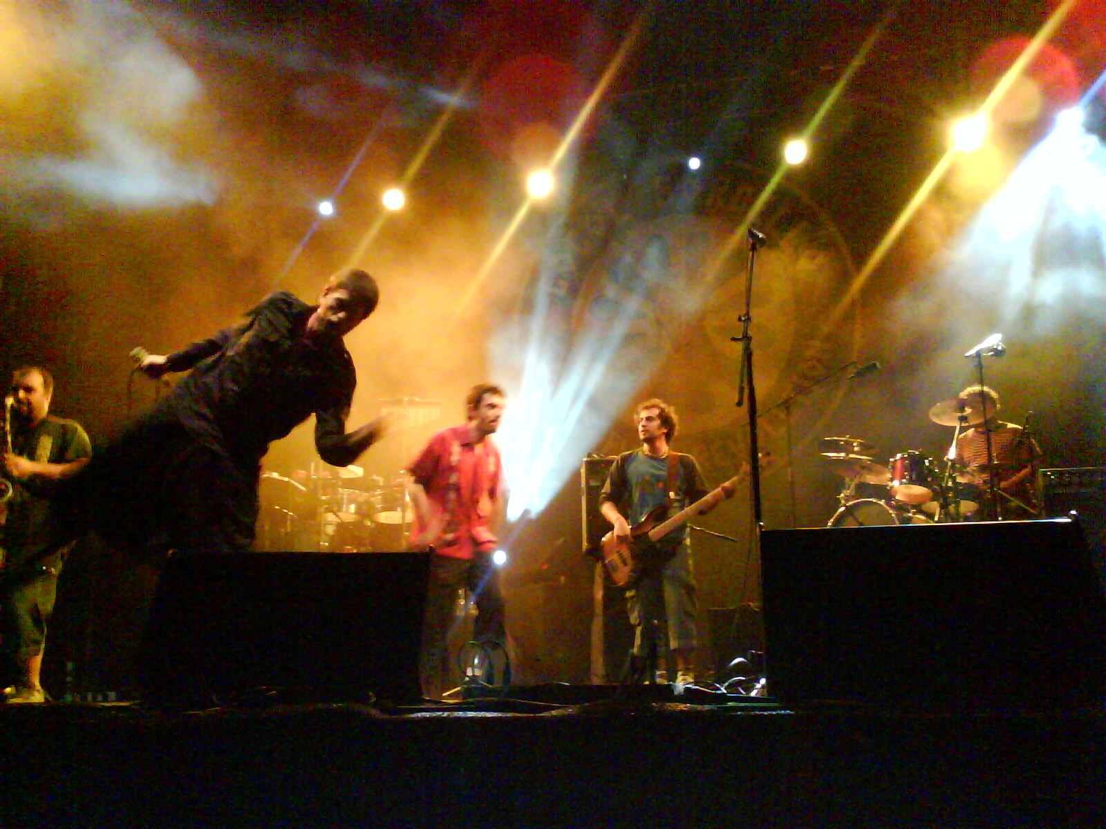 Muy buenos. No los conocía (pues sí, qué pasa) y me han encantado. Suenan así rollo ská, reggae, fiesta trompetera. Sergio "Trosma", el cantante es todo un espectáculo.